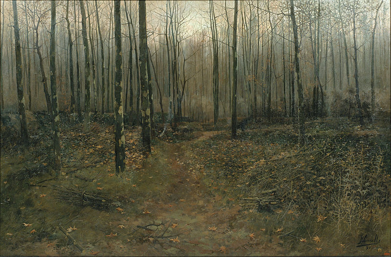 Joaquín Vancells. Febrero: paisaje (1891). Museo Nacional de Arte de Cataluña